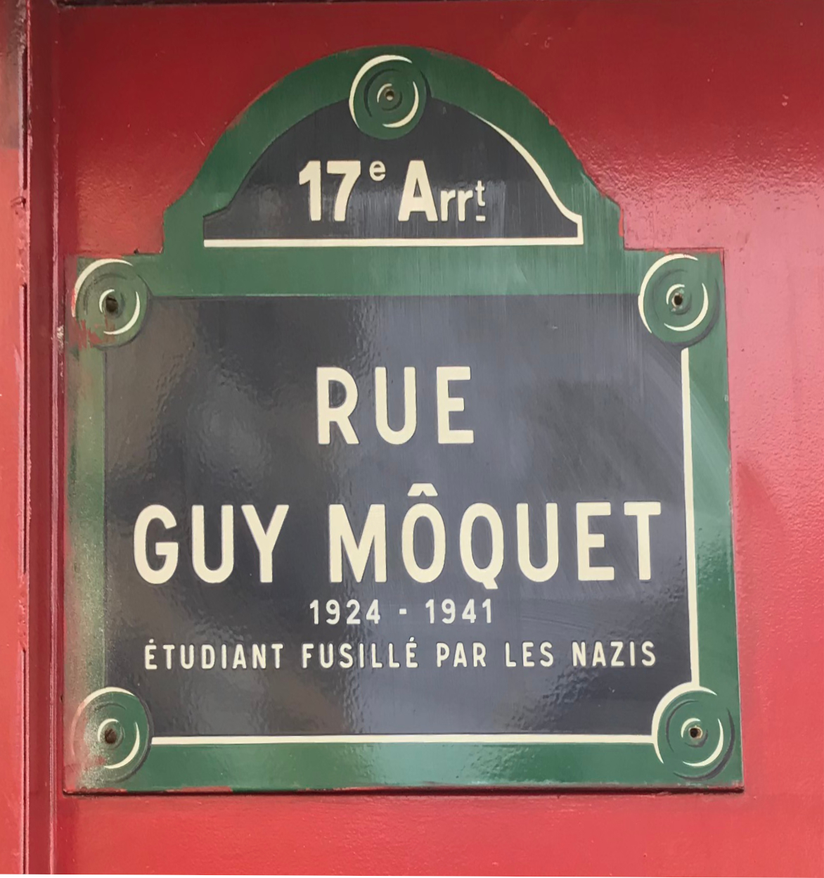 Image de Paris, septembre 2018.